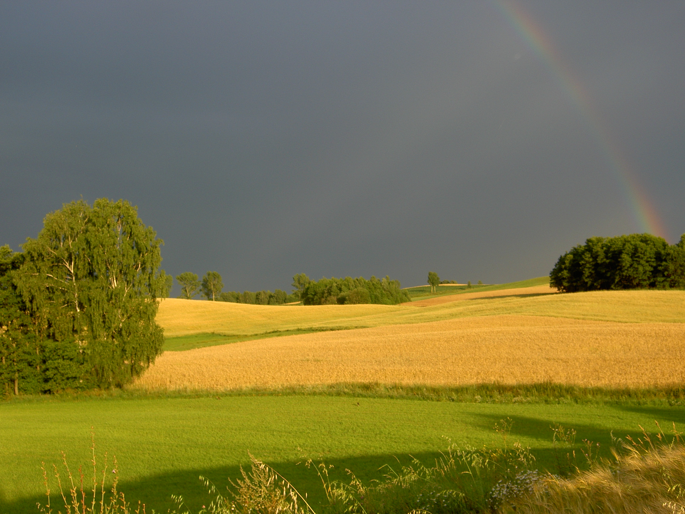 Okolice Toroszyszek